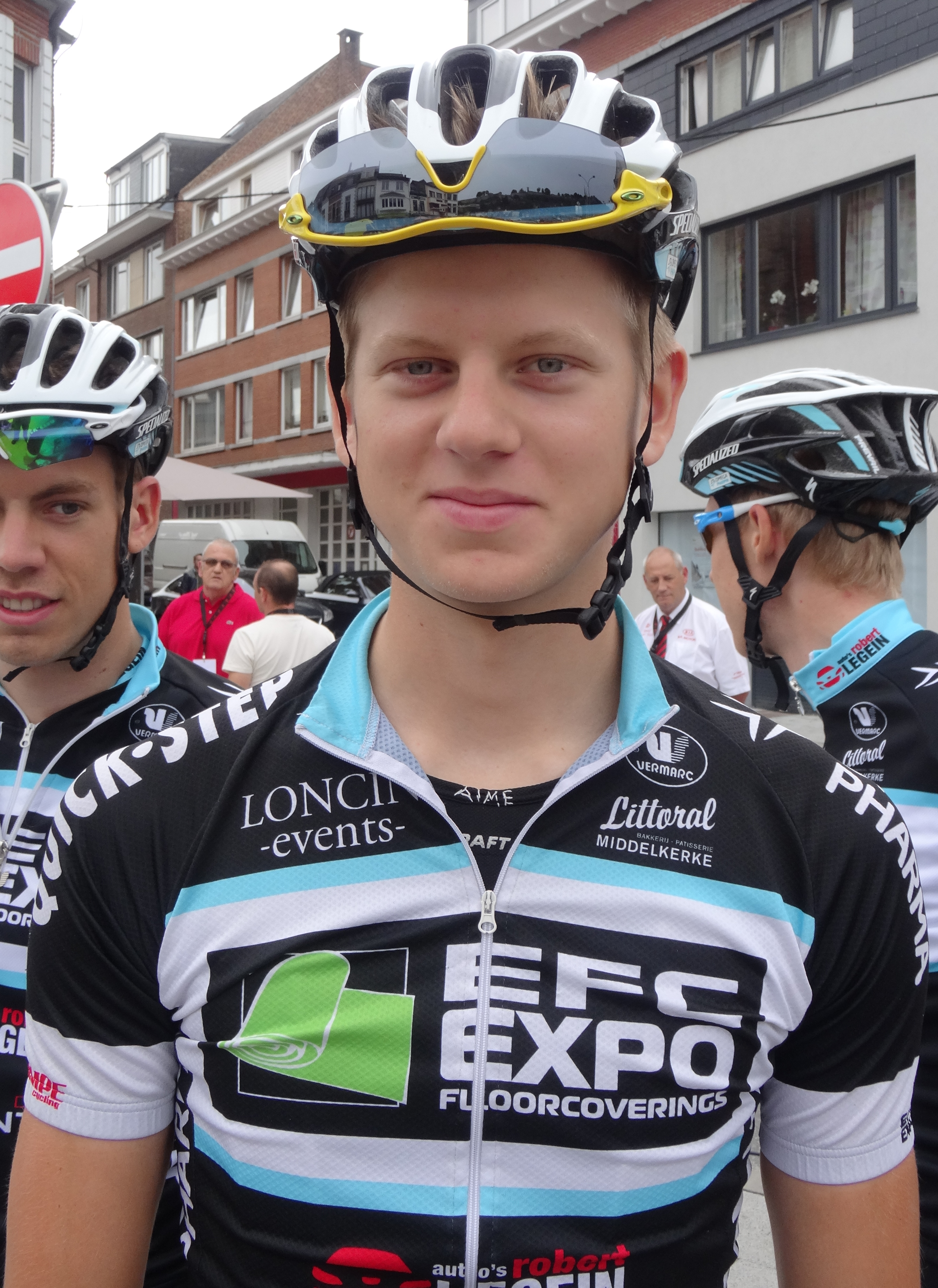 Reportage photographique réalisé le mercredi 6 août à l'occasion du départ de la première étape du Tour de la province de Namur 2014 à Jambes (Namur), Belgique.